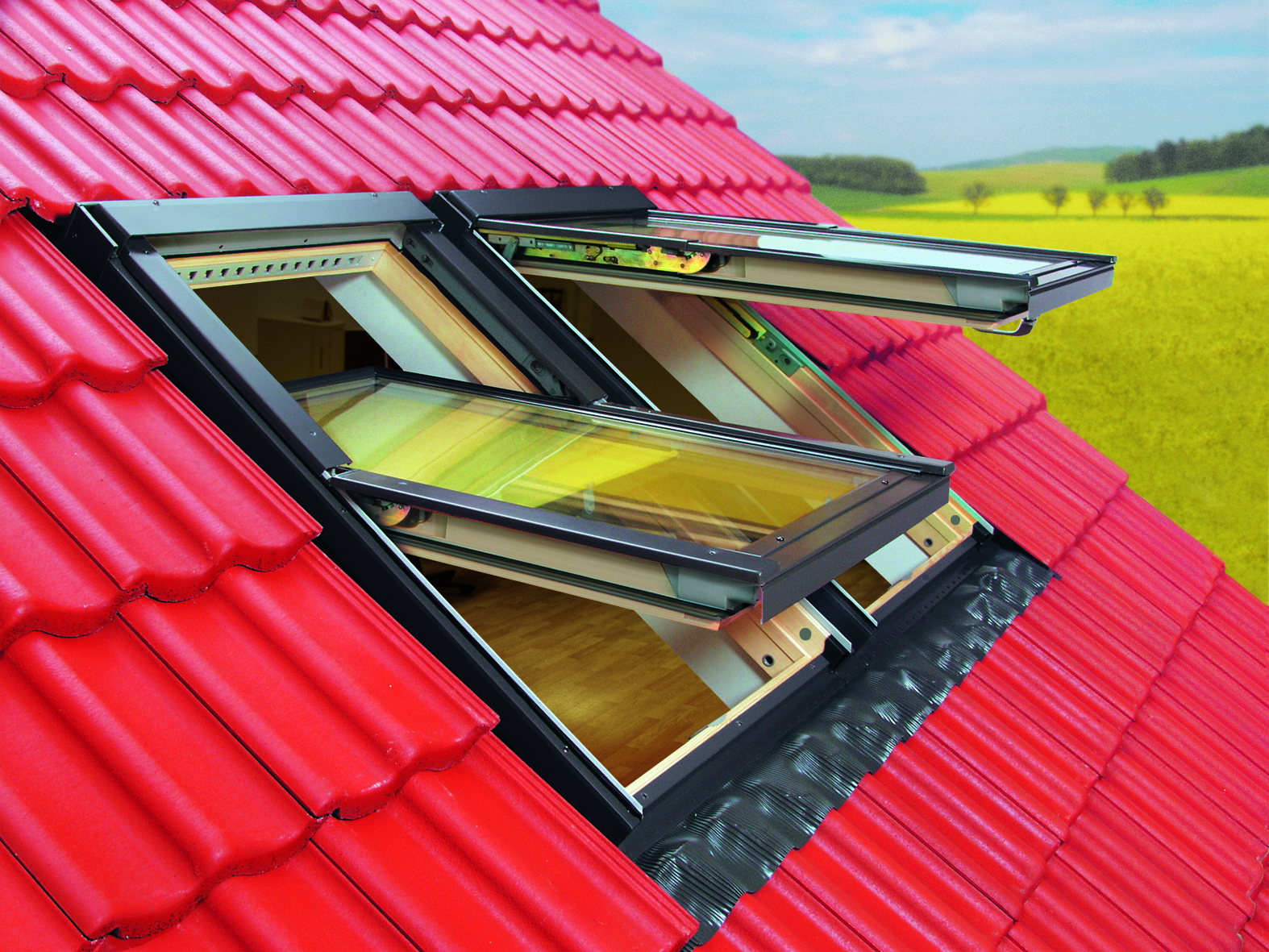 Dachfenster. Klapp-Schwingfenster.